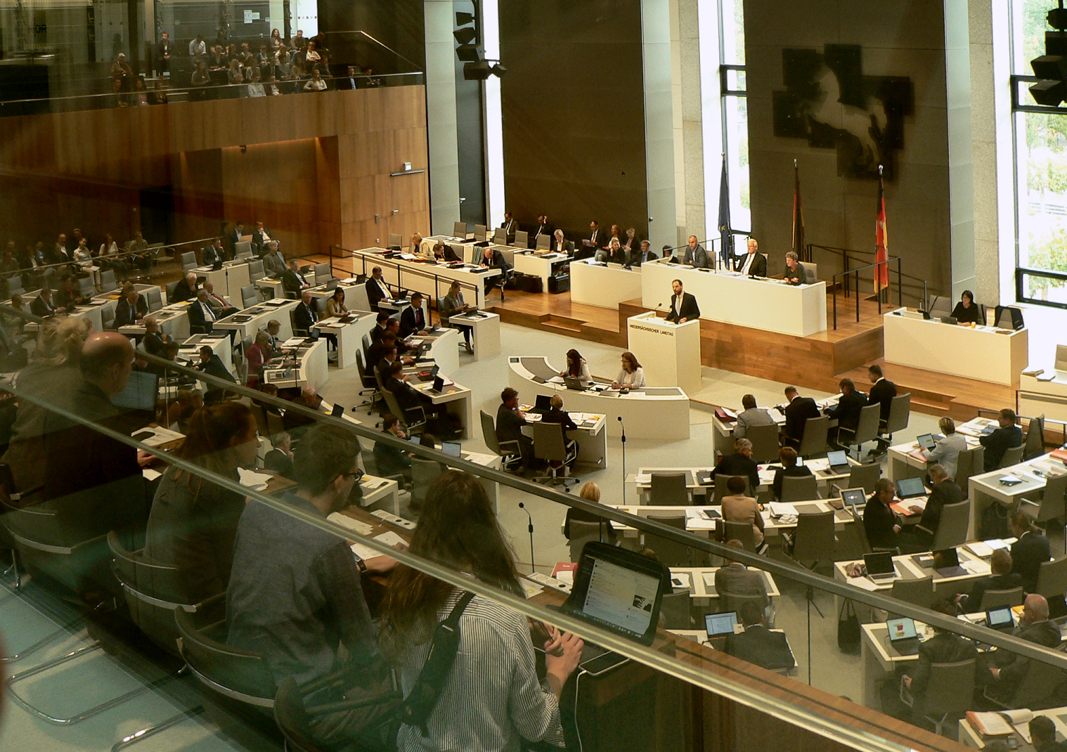 Plenarsaal im Niedersächsischer Landtag